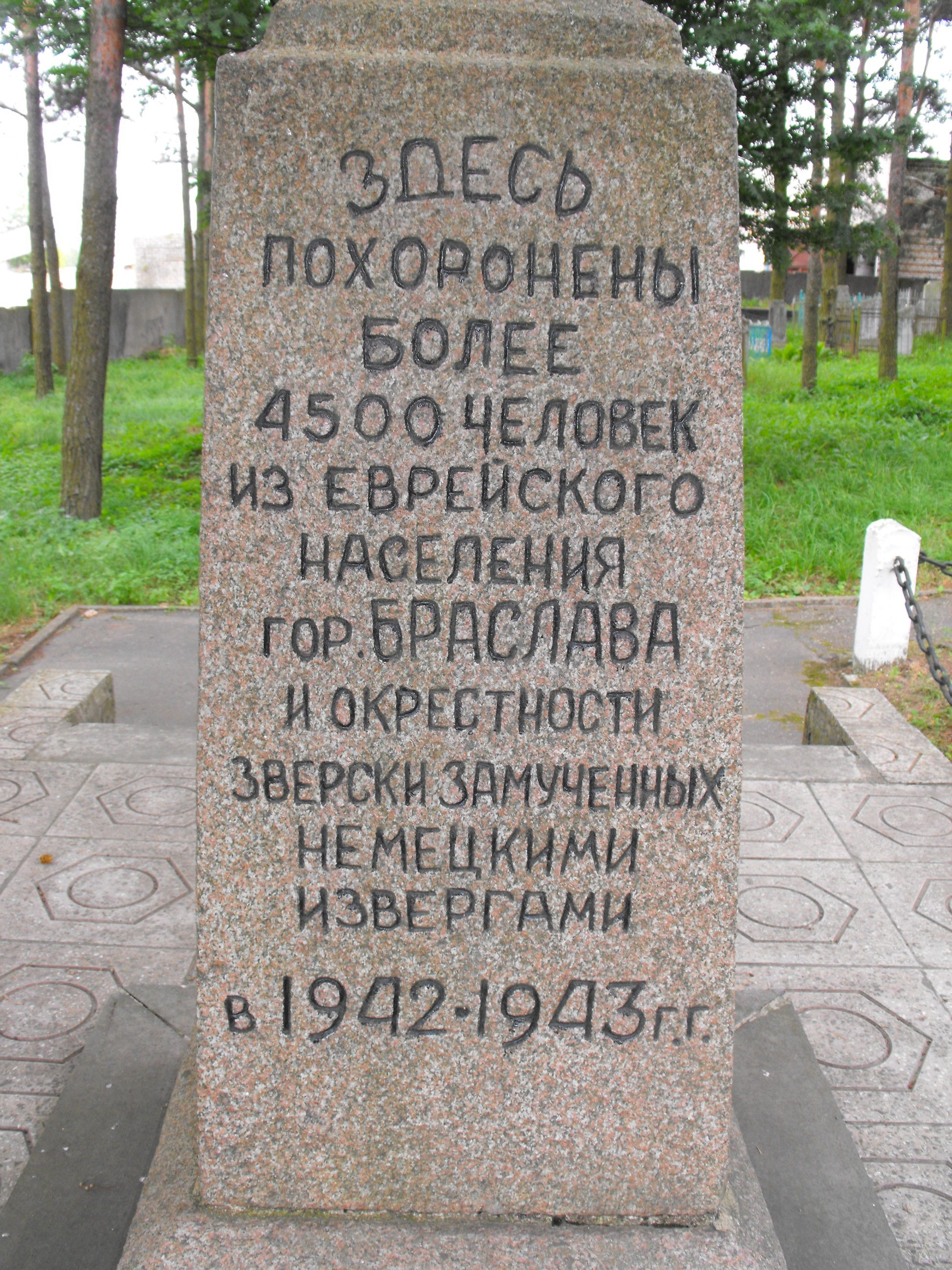 Памятник, установленный уцелевшими евреями Браслава и их потомками на еврейском кладбище в 1960-х годах в память об 4000 убитых на этом месте немецкими нацистами и полицаями во время Холокоста узниках Браславского гетто и гетто в Опсе. Находится внутри ограды еврейского кладбища в Браславе на улице Дзержинского возле дома № 77, напротив дома № 52. Возле памятника ограждены места расстрельных рвов.